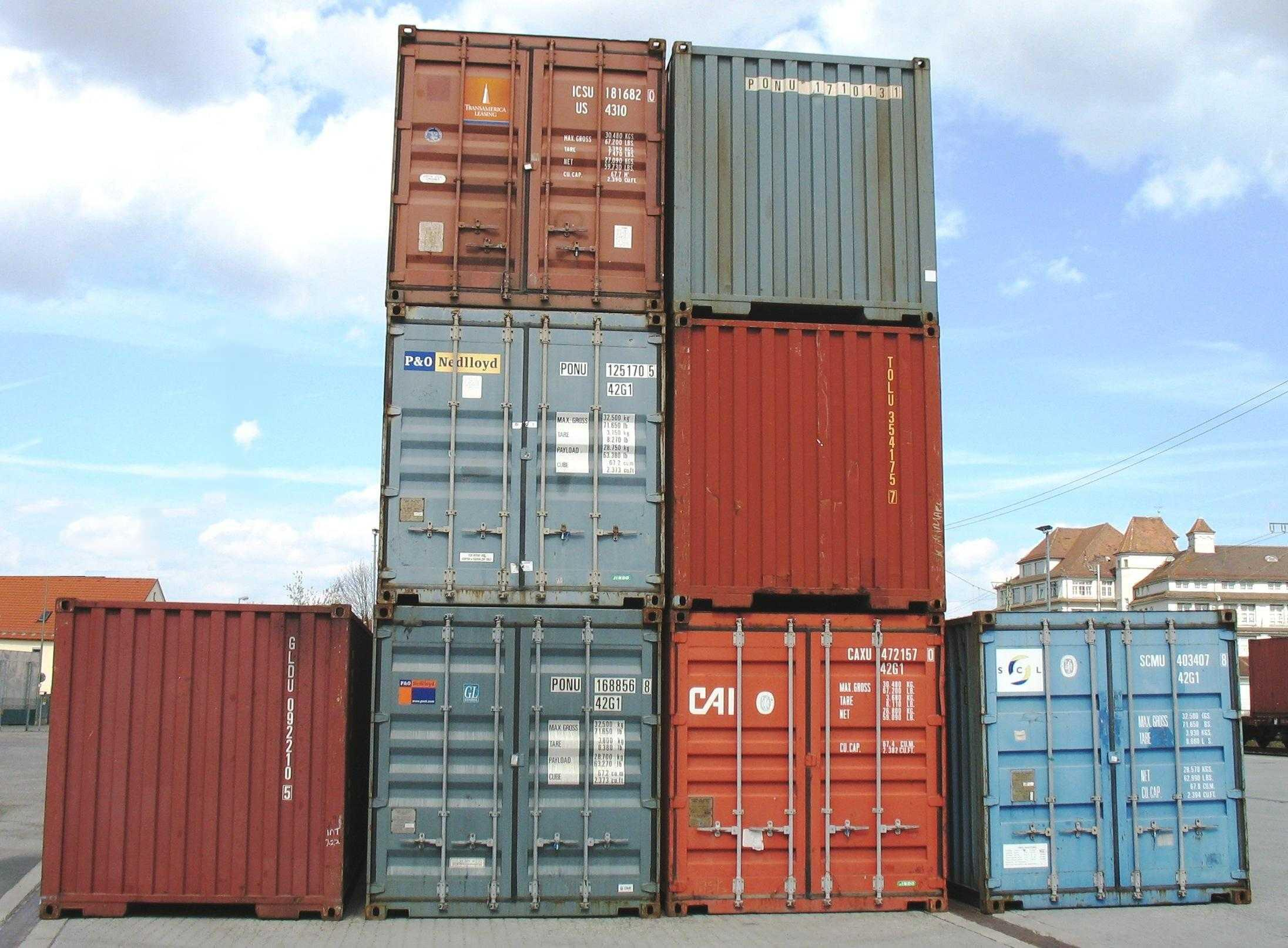 Container, Bahn-Güterterminal Augsburg Oberhausen